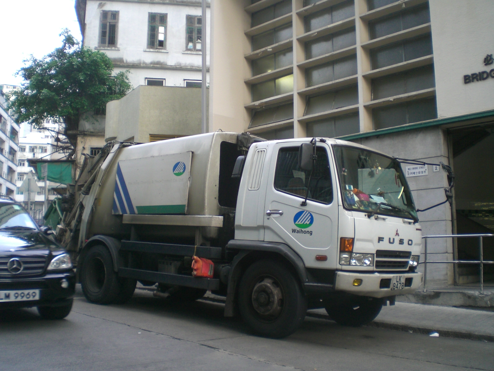 上環必列者士街垃圾站, 垃圾車 & 必列者士街街市